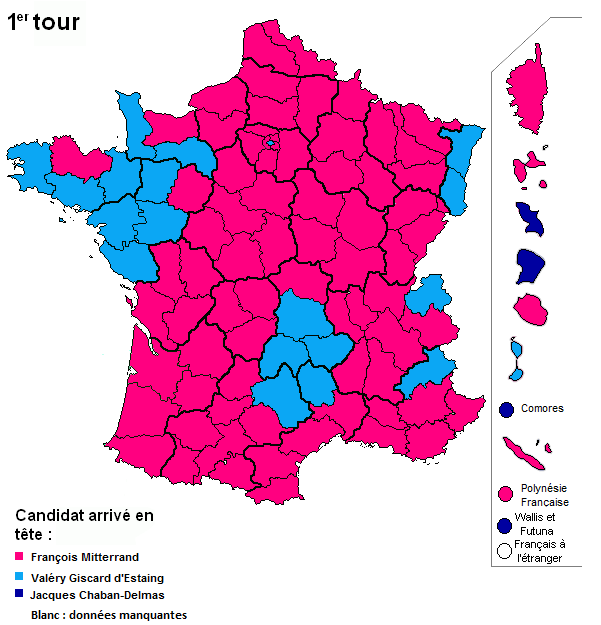 Candidat arrivé en tête du 1er tour des élections présidentielles françaises de 1974, département par département